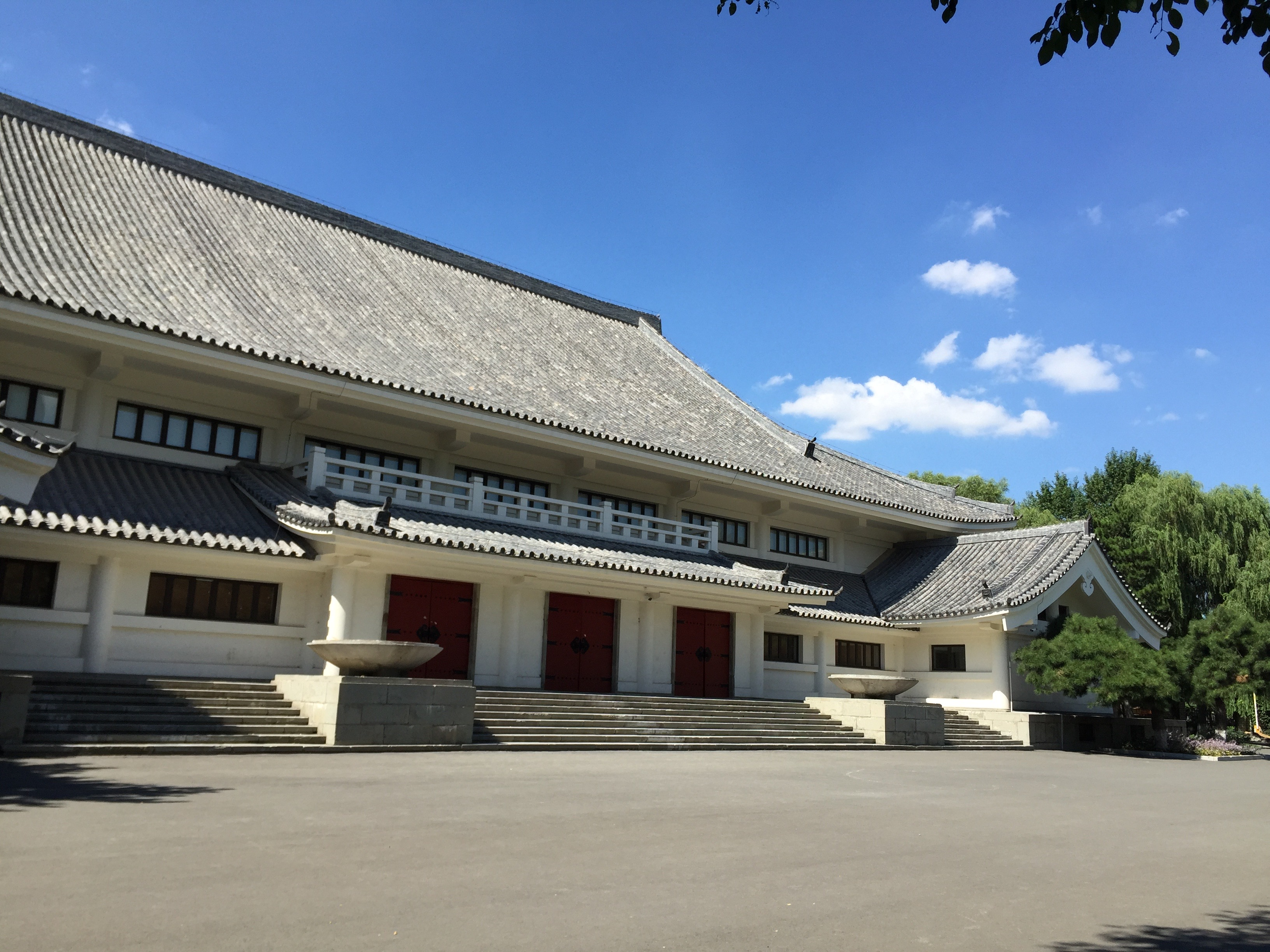 中文（中国大陆）: 鸣放宫